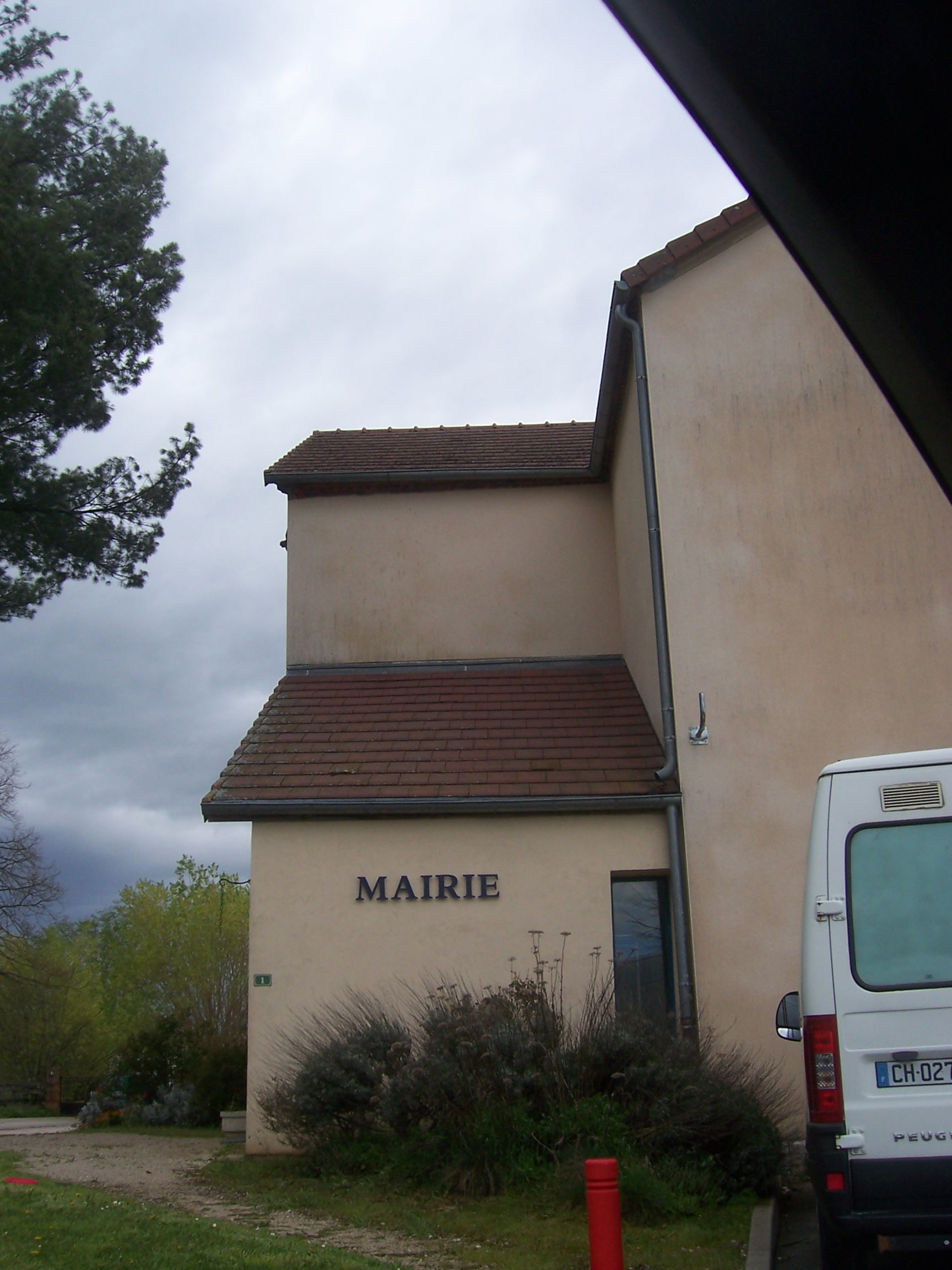 Mairie de Chemenot